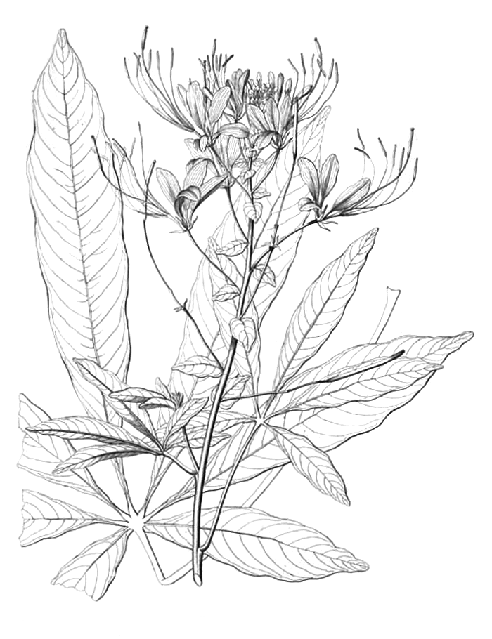 Cleome speciosa Volume 5, Tab 436 Nova genera et species plantarum :quas in peregrinatione ad plagam aequinoctialem orbis novi collegerunt /descripserunt, partim adumbraverunt Amat. Bonpland et Alex. de Humboldt ; ex schedis autographis Amati Bonplandi in ordinem digessit Carol. Sigismund. Kunth